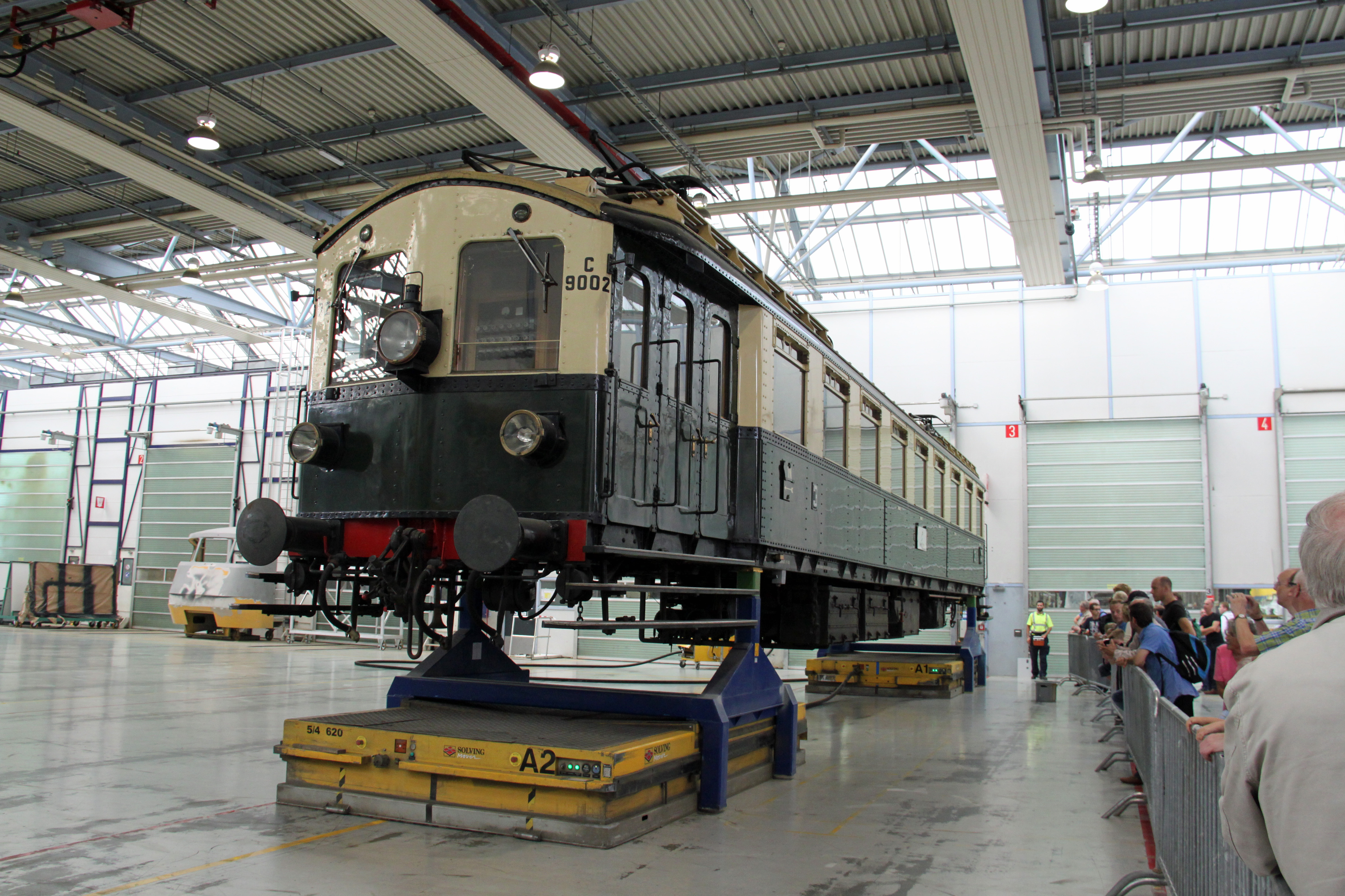 Motorwagen 9002 "Jaap" op de luchtkussens in de werkplaats van Nedtrain te Haarlem